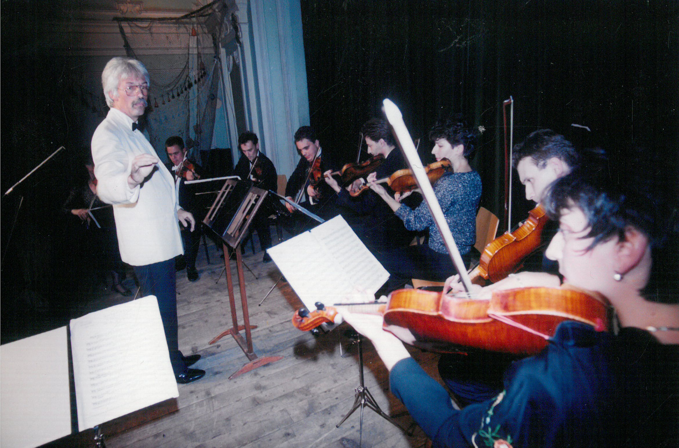 Aleksandar S. Vujić (1945 − 2017) srpski kompozitor, pijanista i dirigent.Foto: Stevan Kragujević (po odobrenju kćerke Tanje Kragujević)